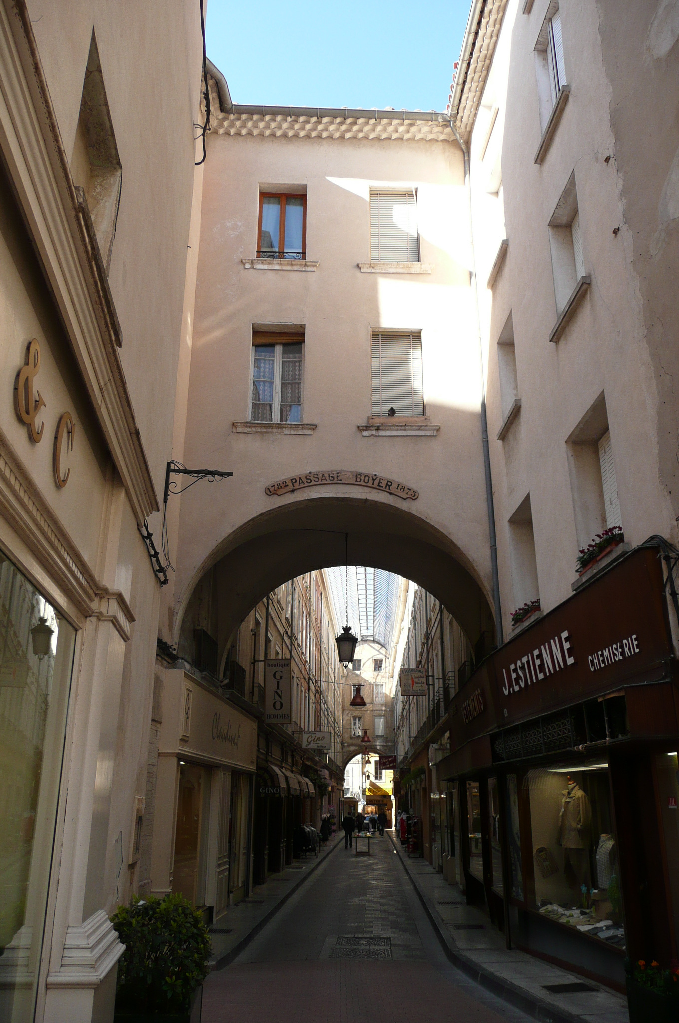 Passage Boyer, rue commerçante couverte à Carpentras